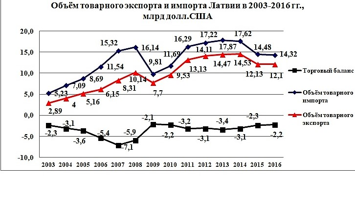 На графике можно увидеть динамику объёма экспорта и импорта Латвии в 2003-2016 гг., млрд долл. США